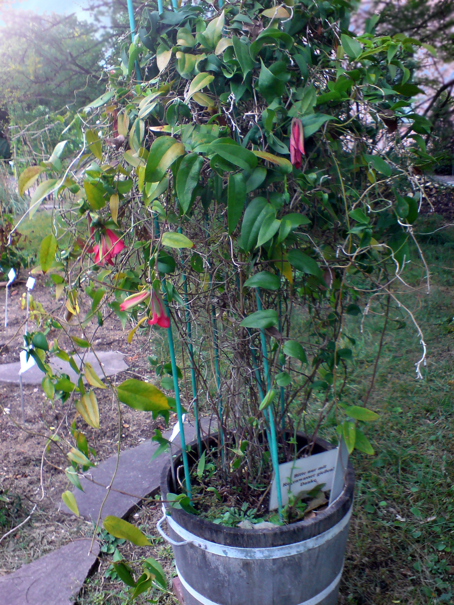 Lapageria rosea (Rosenrote Lapagerie) - Botanischer Garten Leipzig